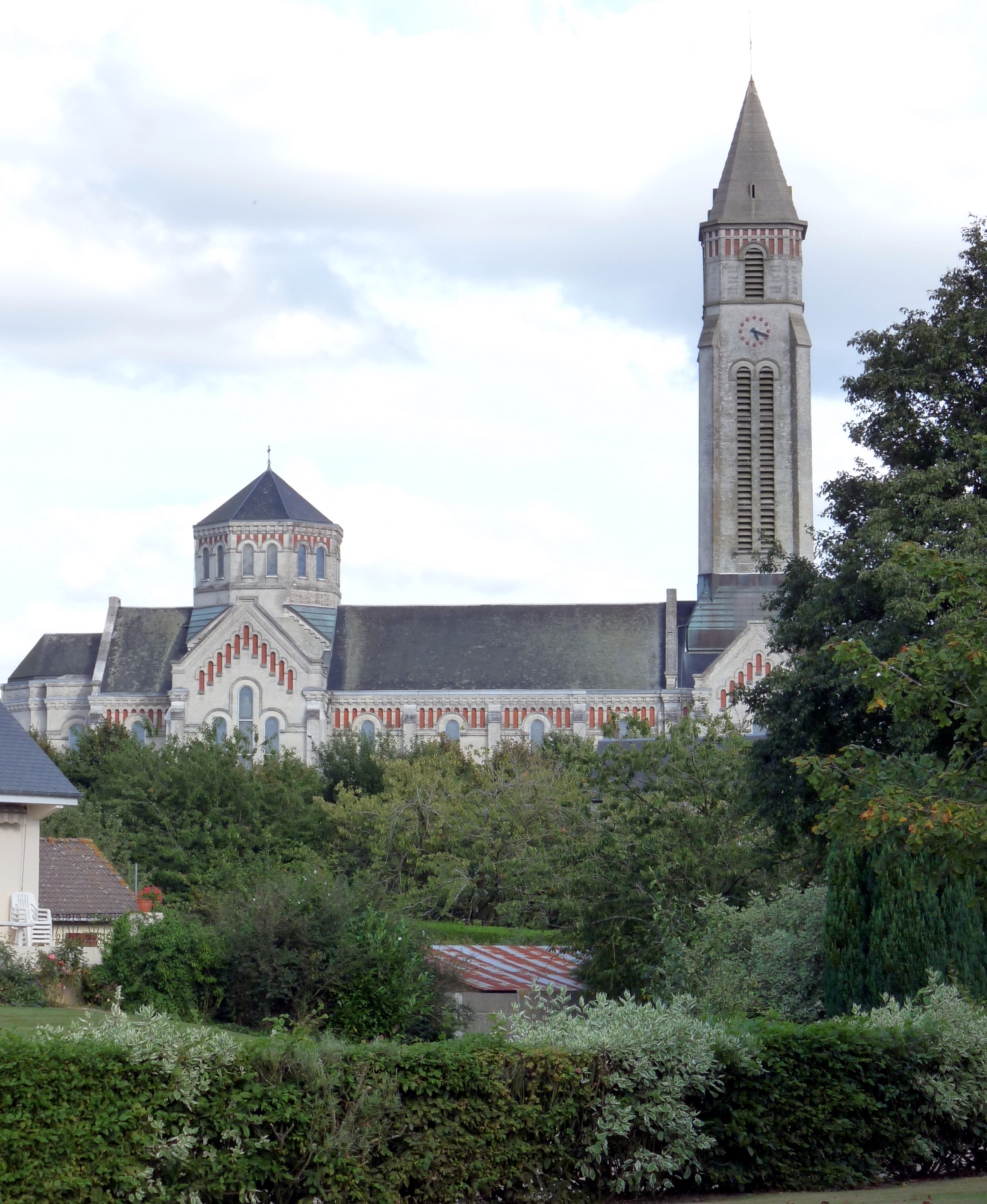 Église Notre-Dame de Fauville-en-Caux .